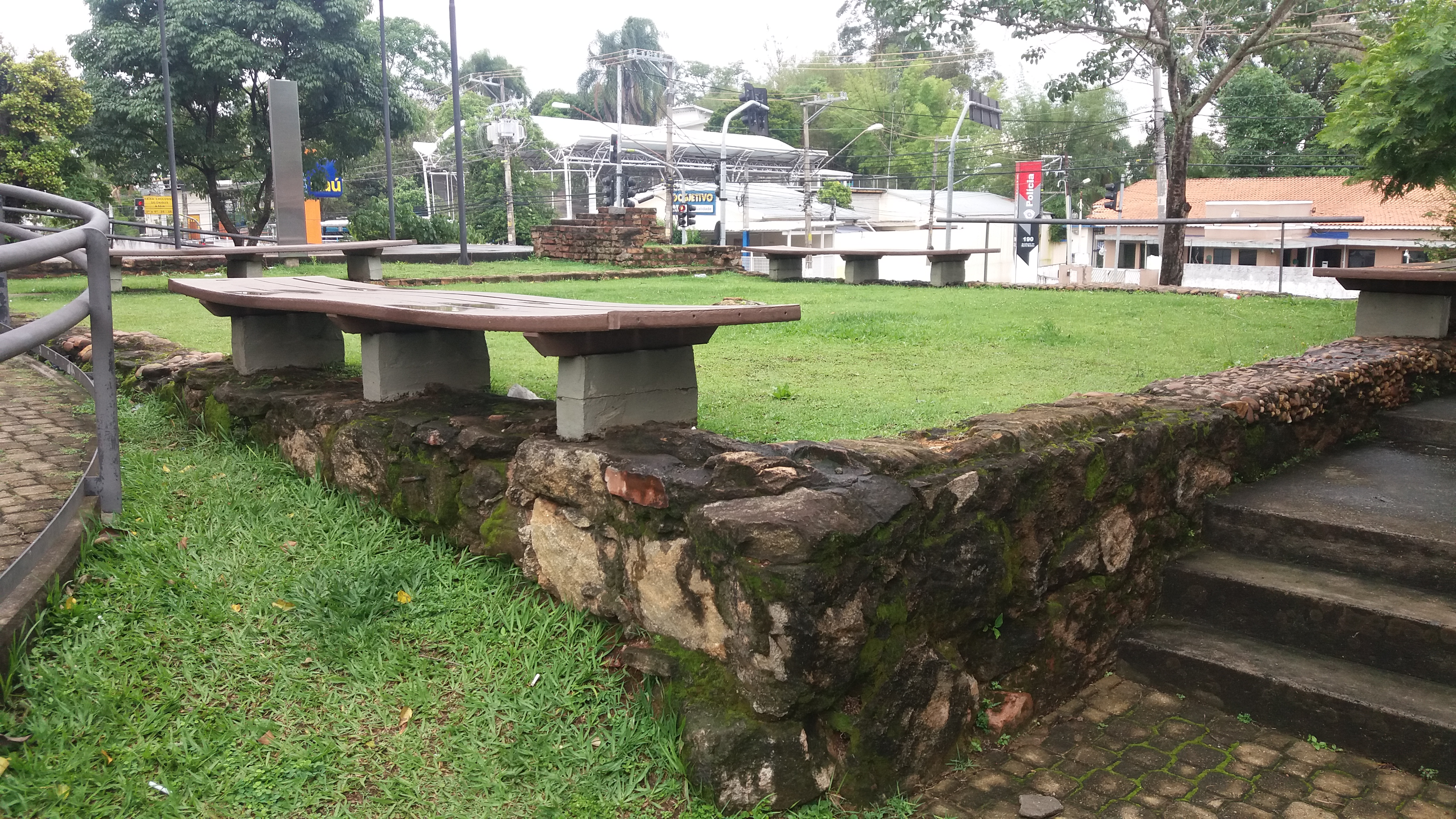 Visão geral das ruínas tombadas pelo CONPRESP (Conselho Municipal de Preservação do Patrimônio Histórico, Cultural e Ambiental da Cidade de São Paulo) da Capela de São Sebastião do Barro Branco, na esquina entre a Avenida Água Fria e a Avenida Nova Cantareira.